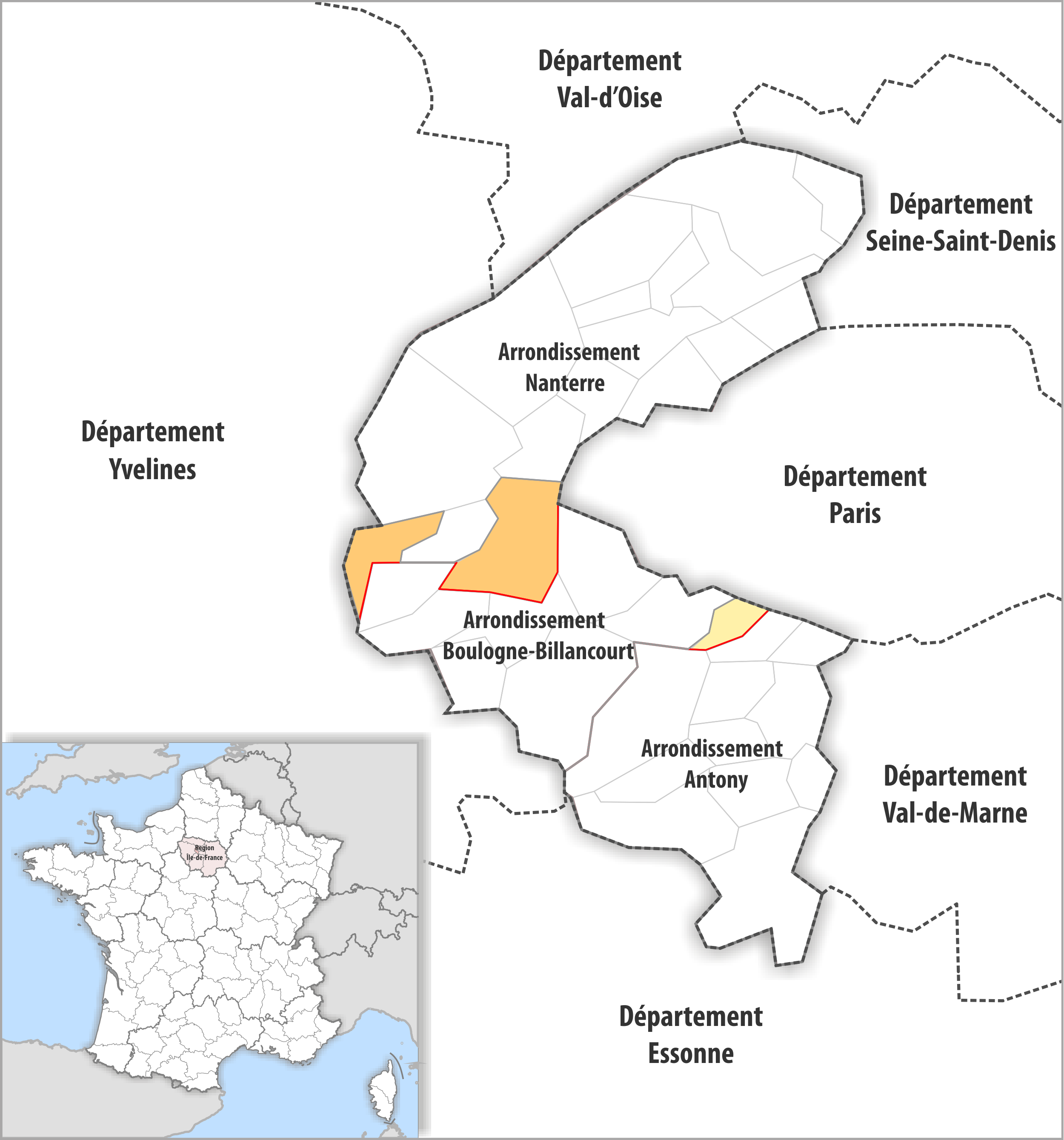 Arrondissements Anpassungen auf 2017 im Departement Hauts-de-Seine